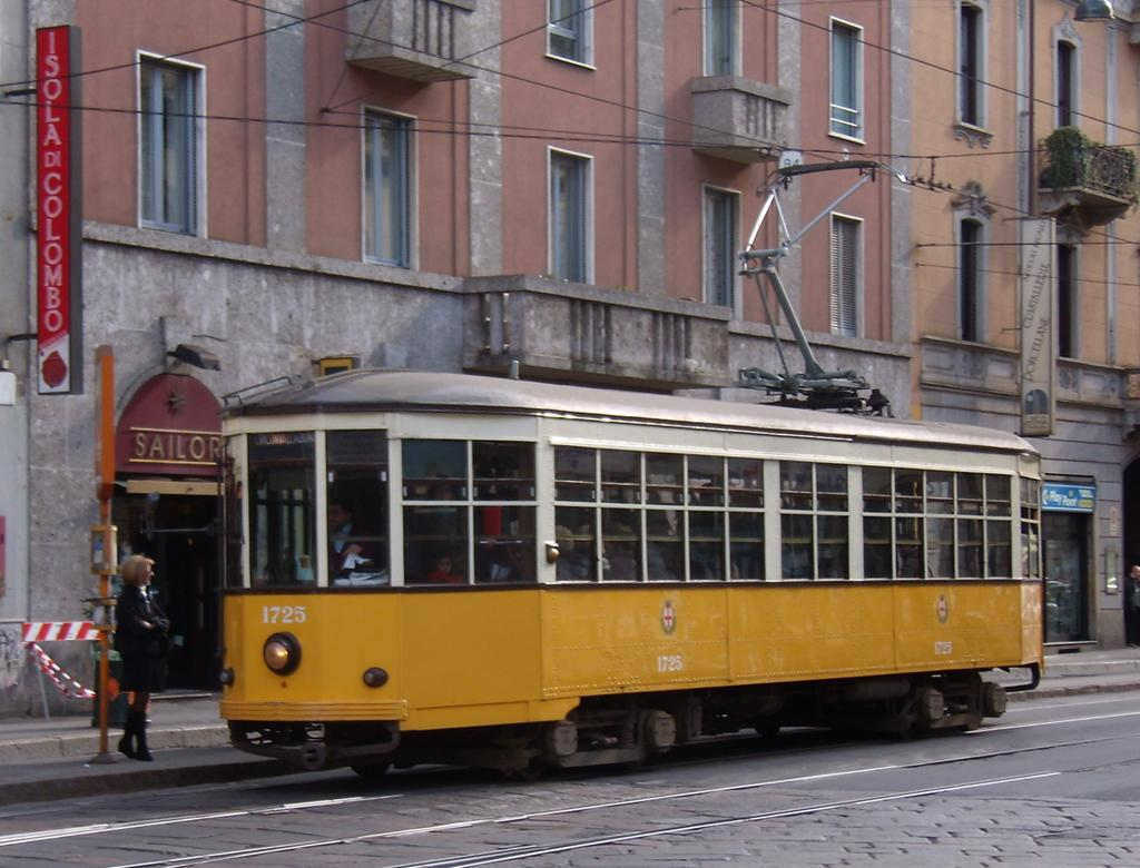 Vettura tranviaria n. 1725 dell'ATM di Milano in servizio sulla linea 30, alla fermata di corso Colombo.